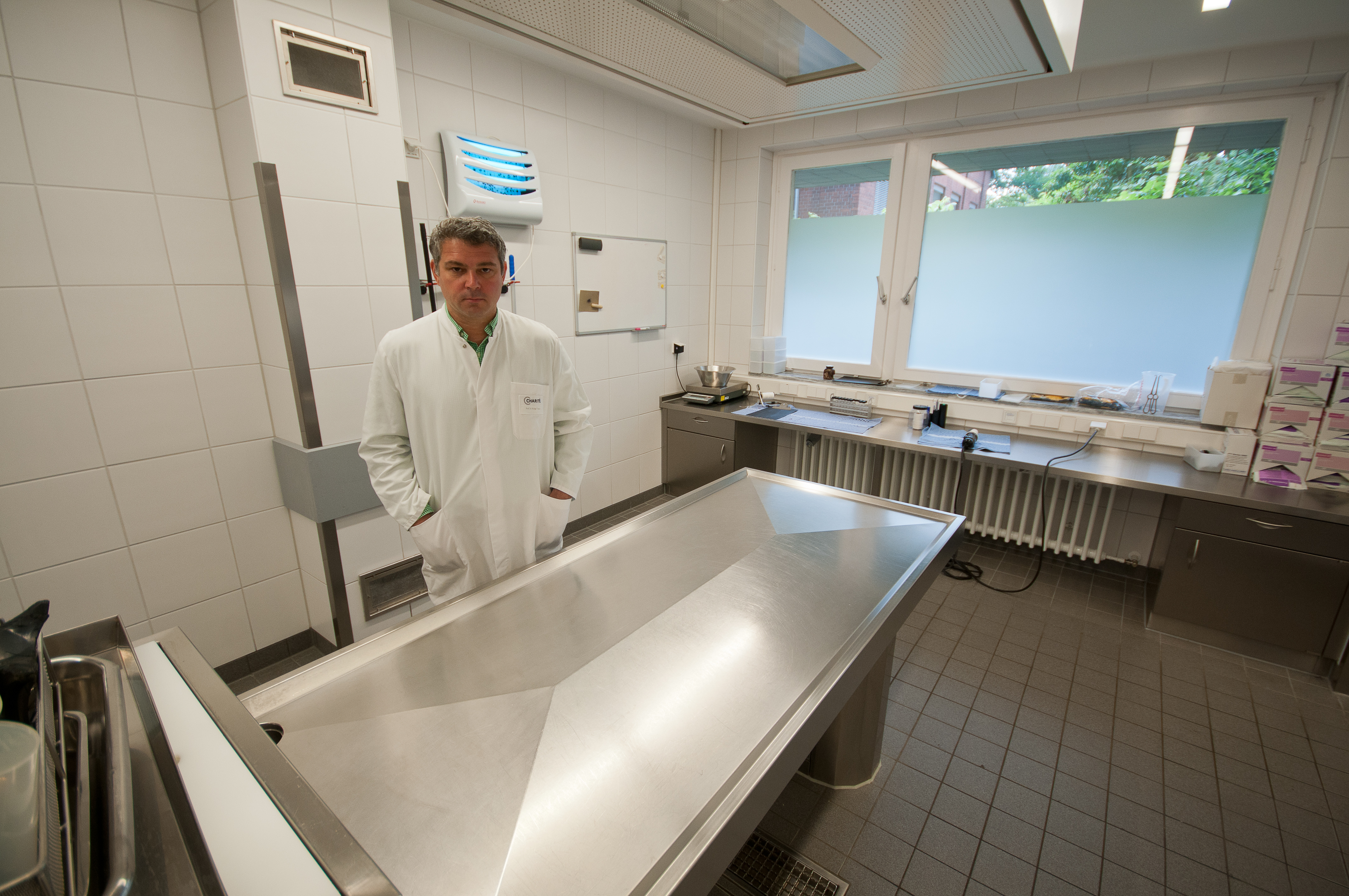 Michael Tsokos Personality rights warningAlthough this work is freely licensed or in the public domain, the person(s) shown may have rights that legally restrict certain re-uses unless those depicted consent to such uses. In these cases, a model release or other evidence of consent could protect you from infringement claims.